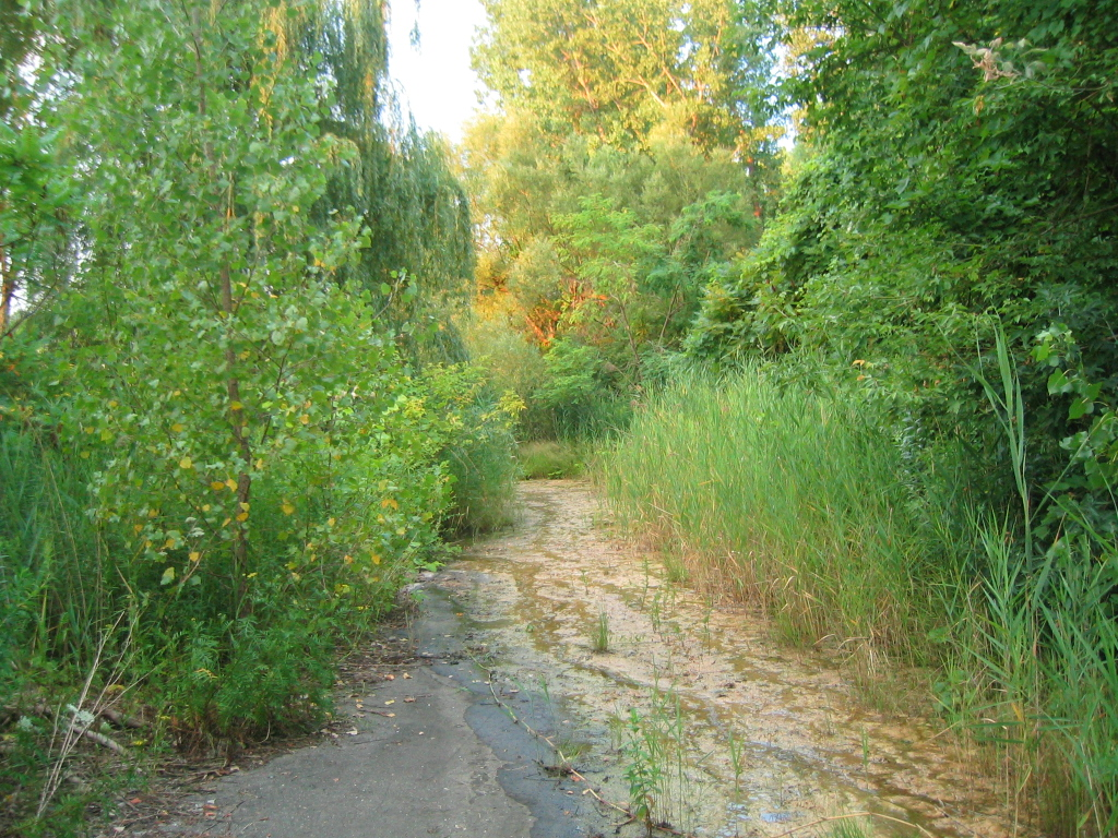 Montreal - Turcot @ 2007, Falaise Saint-Jacques. Ce tronçon de rue reliait autrefois Upper Lachine Road (st-Jacques) à Pullman, non Loin de Cavendish. Plutôt impraticable!